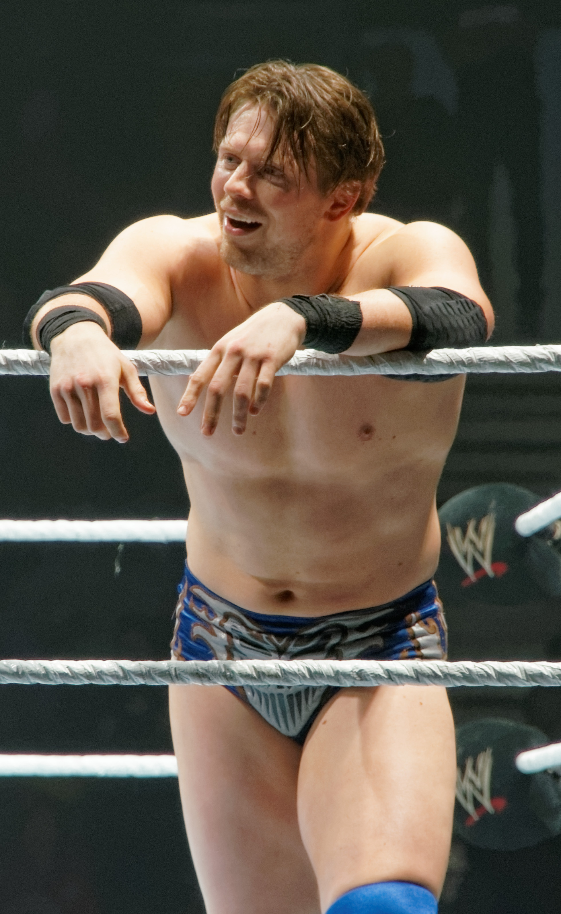 2013-11-08_20-47-08_NEX-6_7890_DxO